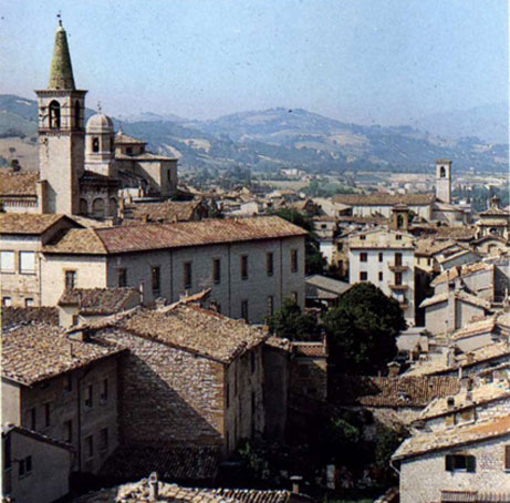 comune di cagli